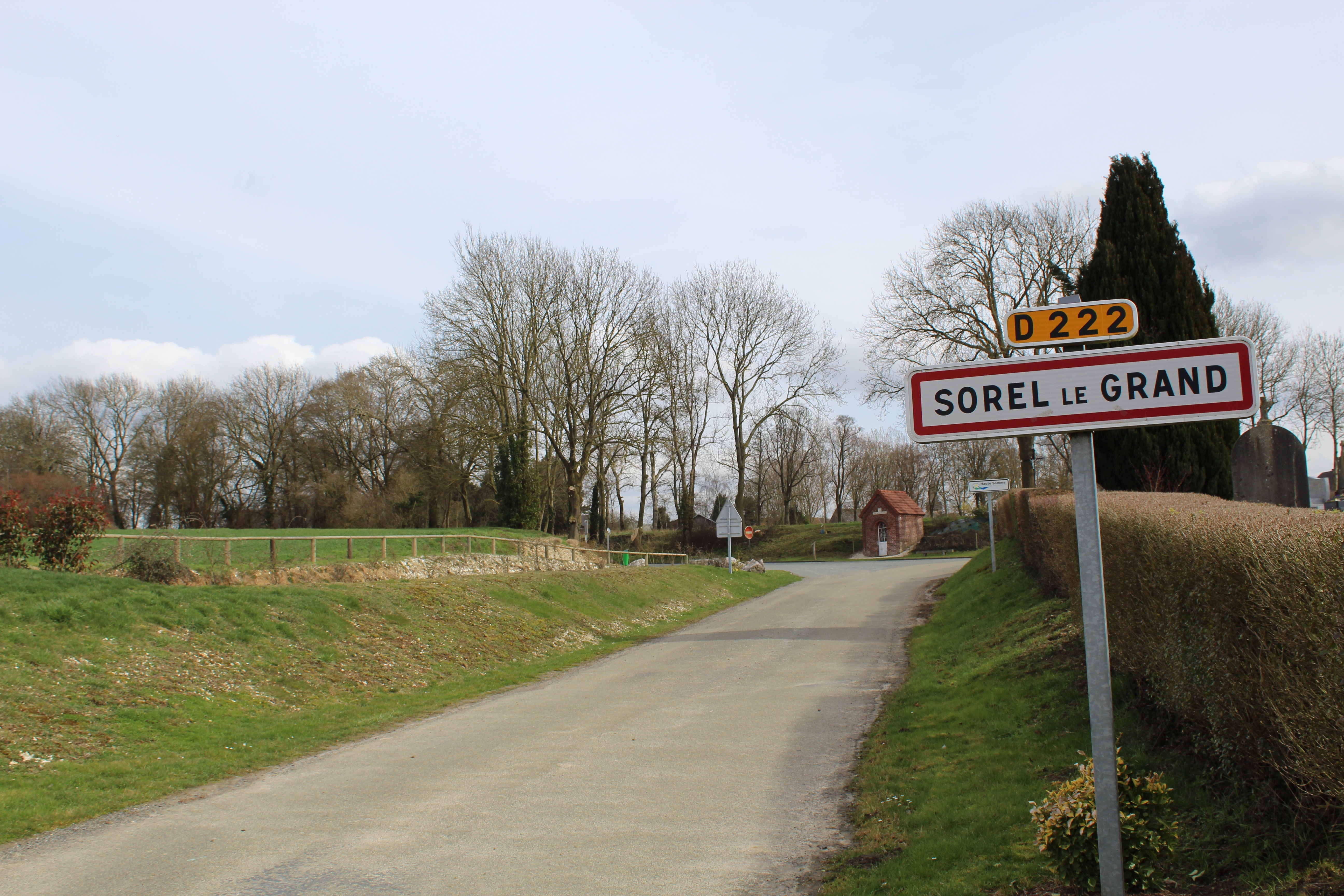 Entré du village.